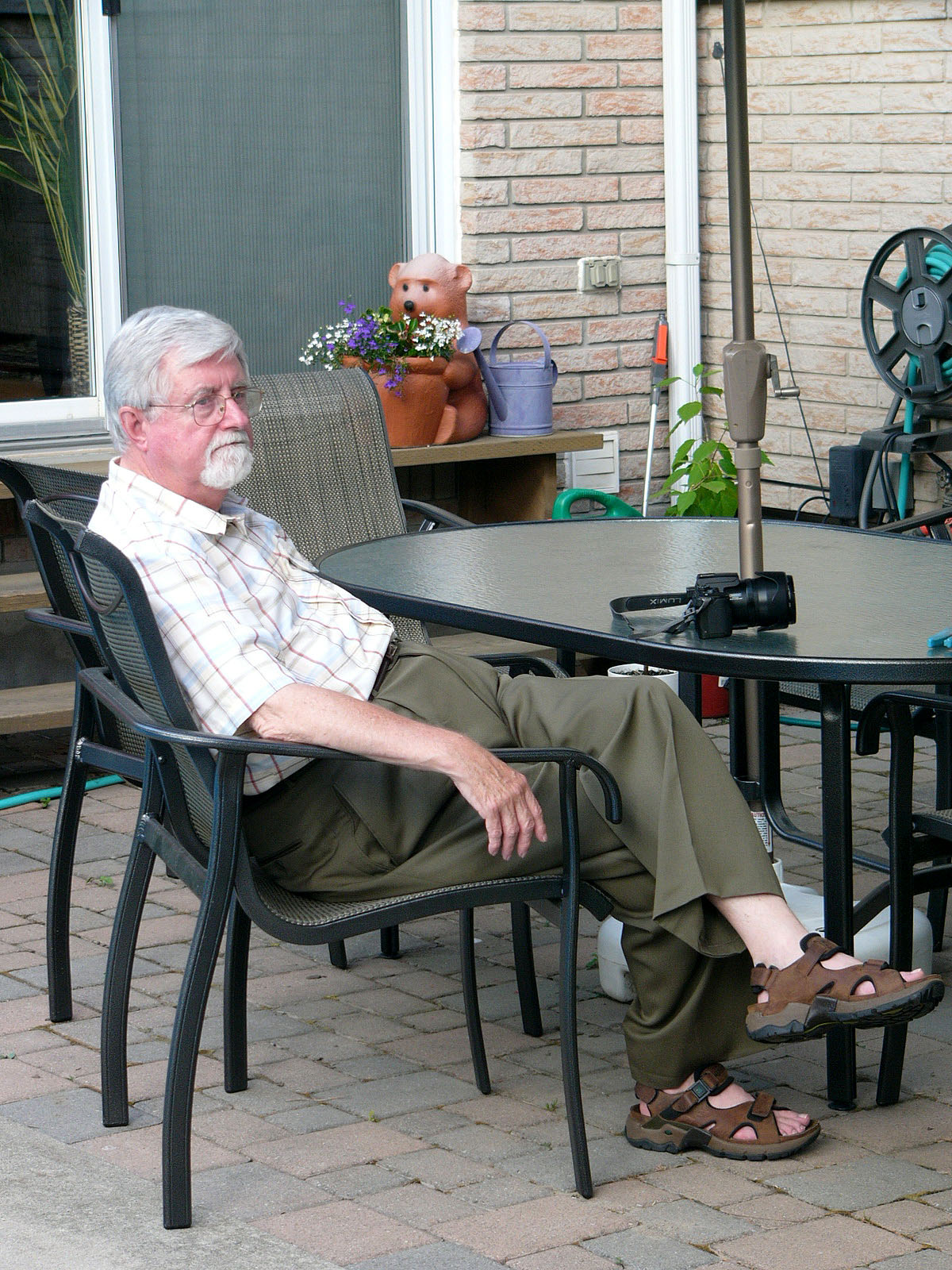 Eugene K. Balon